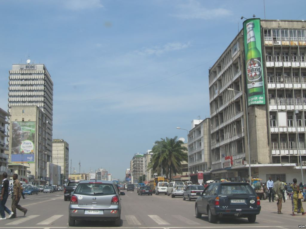 Le boulevard du 30 juin dans Kinshasa.